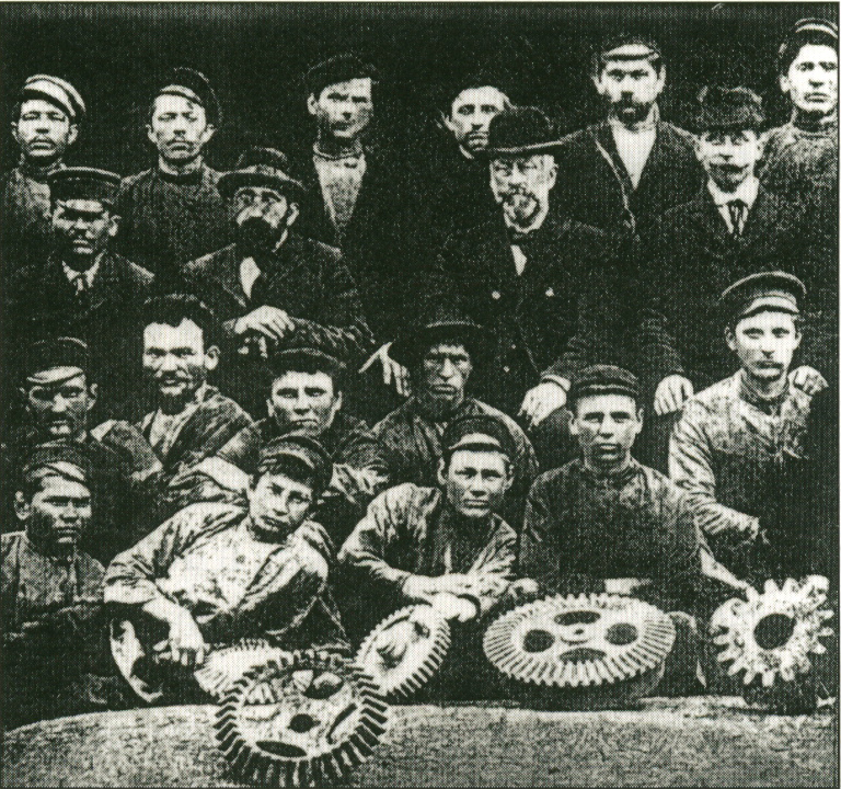 1886. Э.А. Боссе с группой рабочих